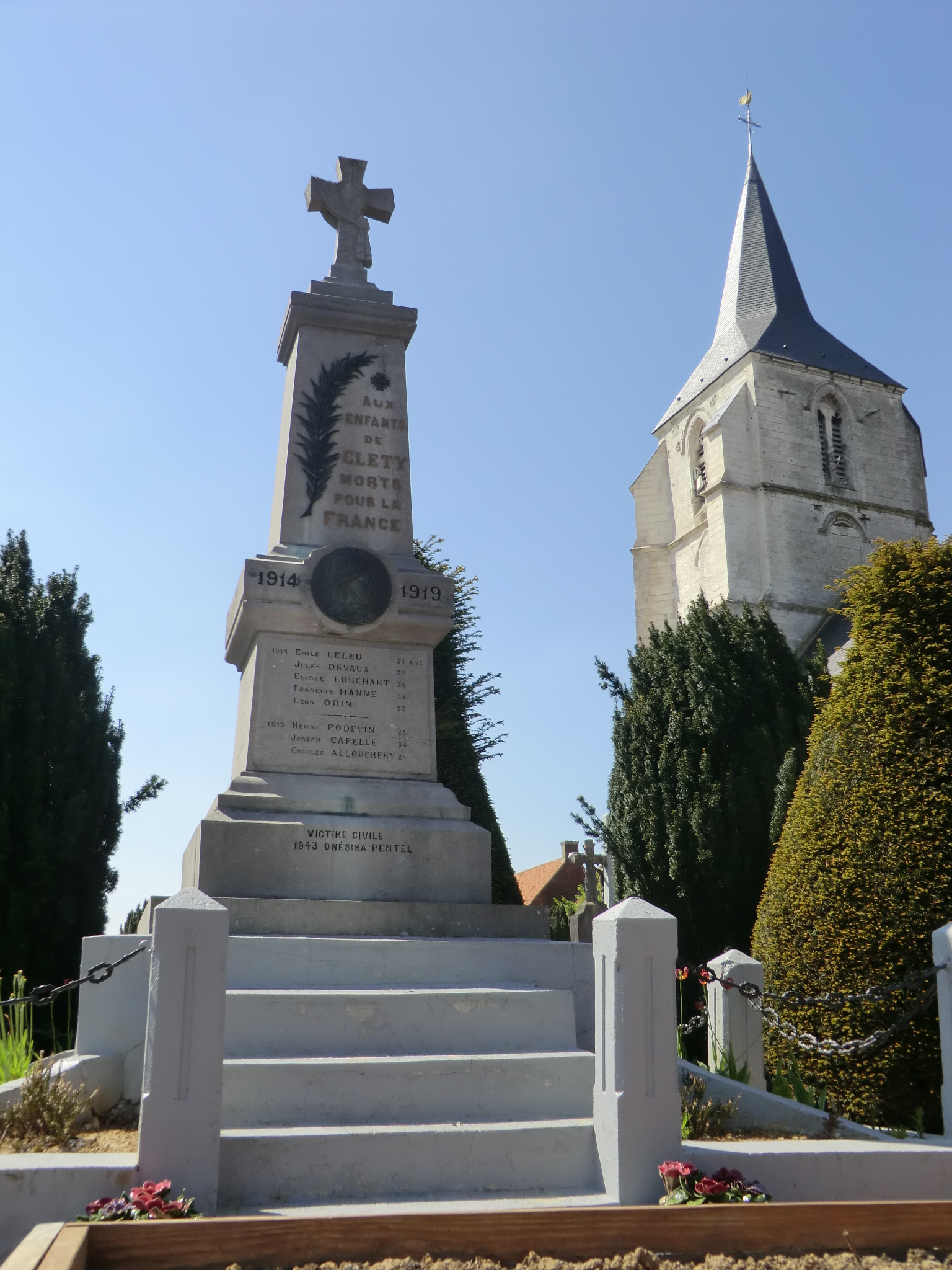 Monument aux morts de Cléty, Nord-Pas-de-Calais, France. Vue sur l'église en arrière-plan.